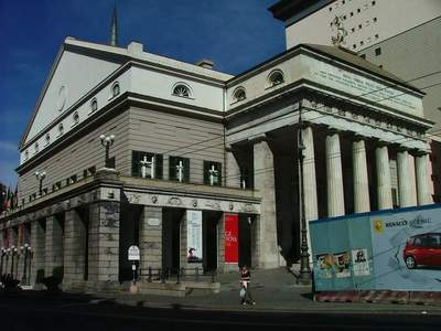 Genova, Italia: Teatro Carlo Felice